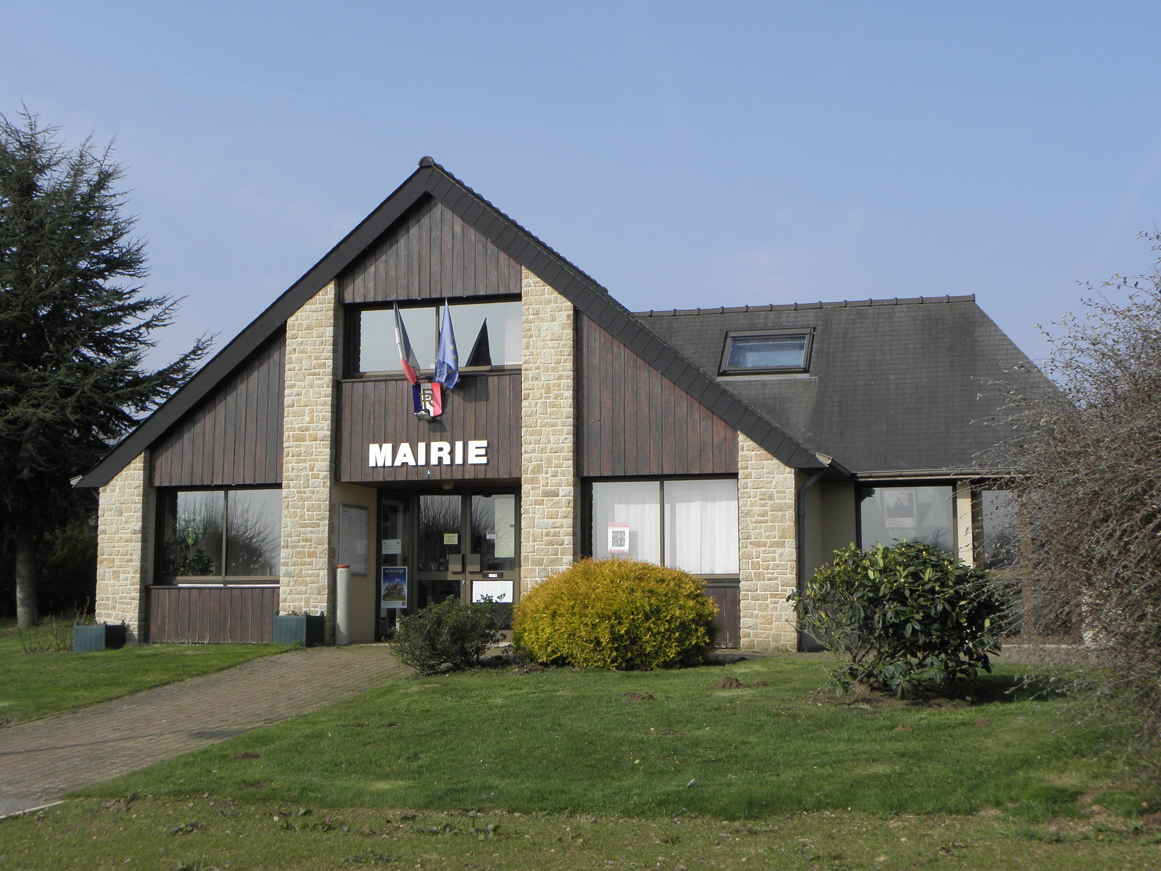 Mairie de Senven-Léhart (22).